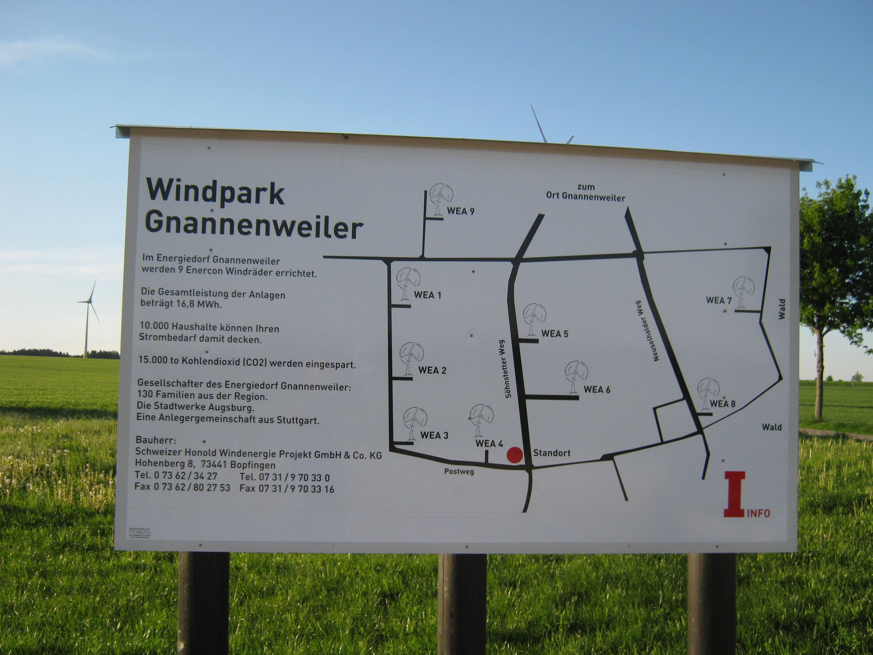 Informationstafel am Windpark Gnannenweiler - OpenStreetMap(Info)